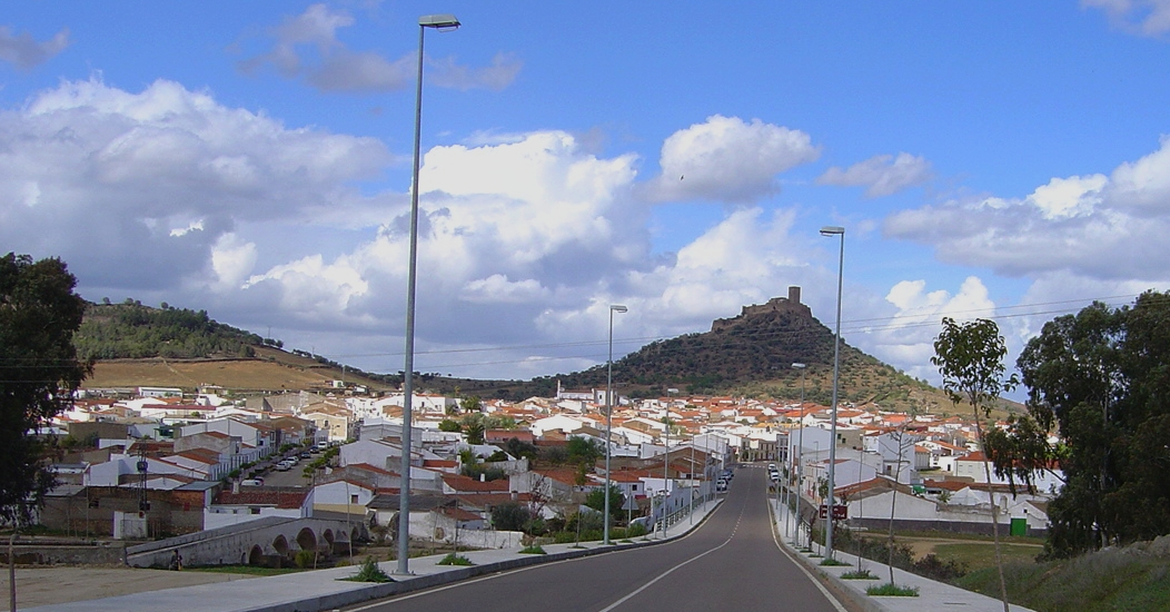 Alconchel, Extremadura, Espanha